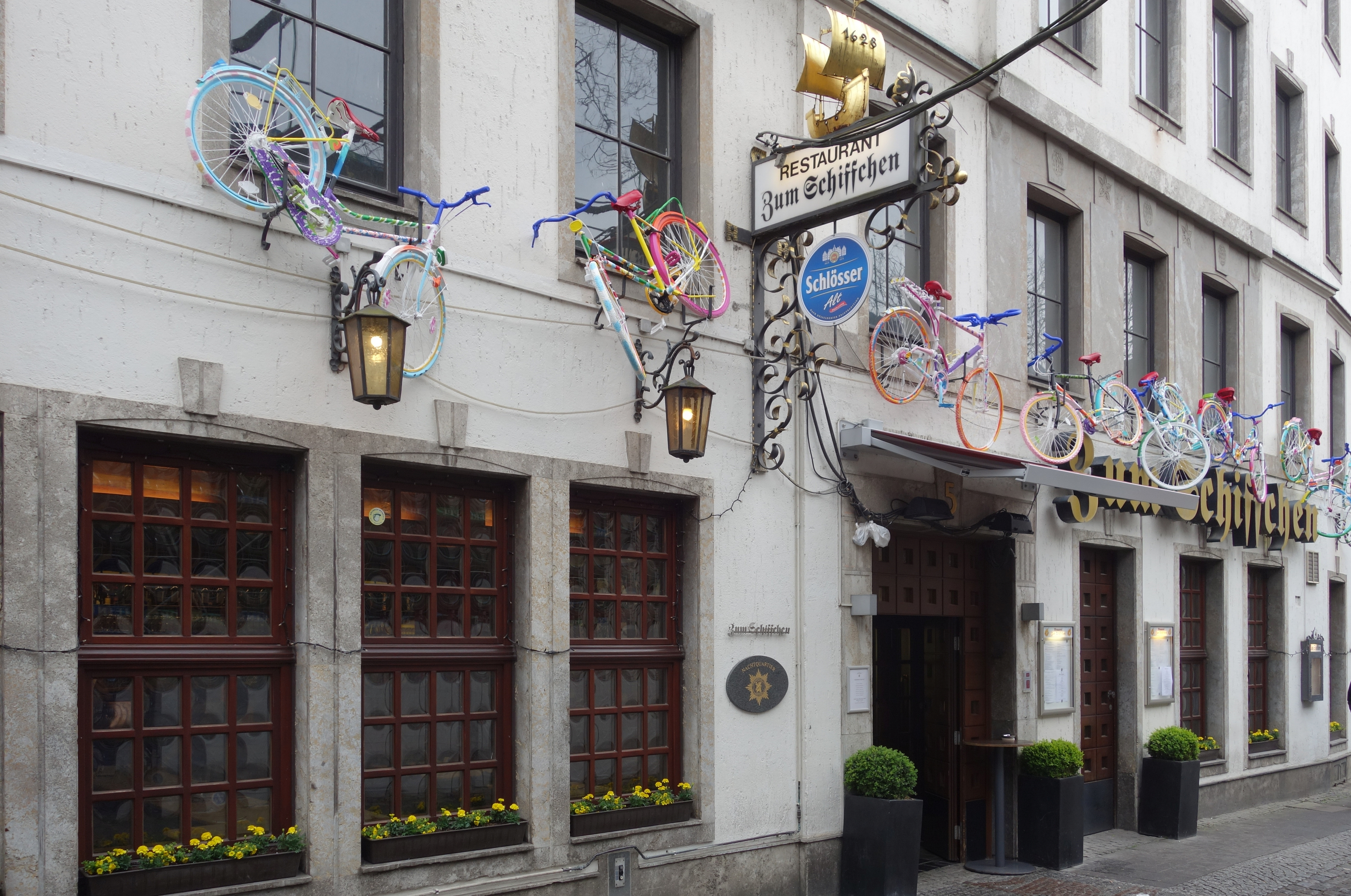 Düsseldorf-Altstadt, Restaurant „Zum Schiffchen“. Dekoriert für die „Tour de France“ mit Start in Düsseldorf. Installation: Bea Schröder, Atelier Micmac. April 2017.